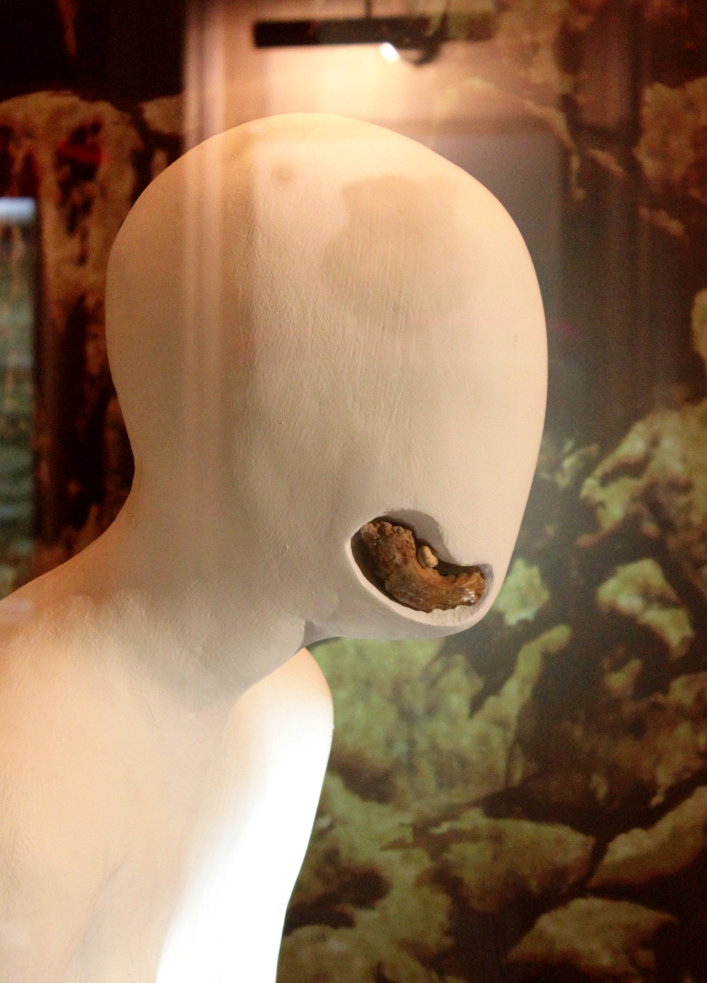 Фрагмент челюсти, найденный в Азыхской (Азохской) пещере в Нагорном Карабахе